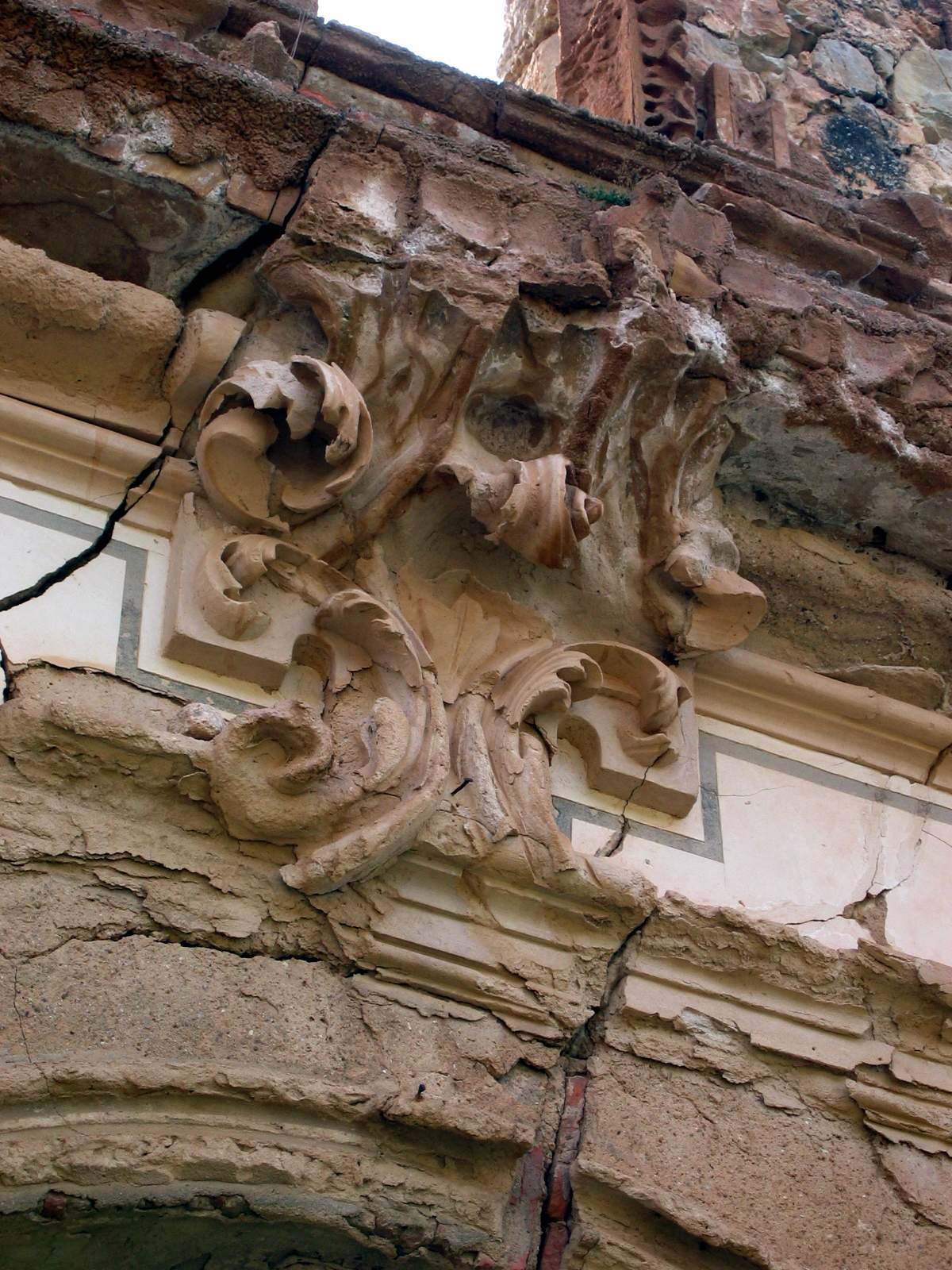 Detalle de las ruinas de la iglesia del Convento de San Guillermo, Castielfabib (Valencia).